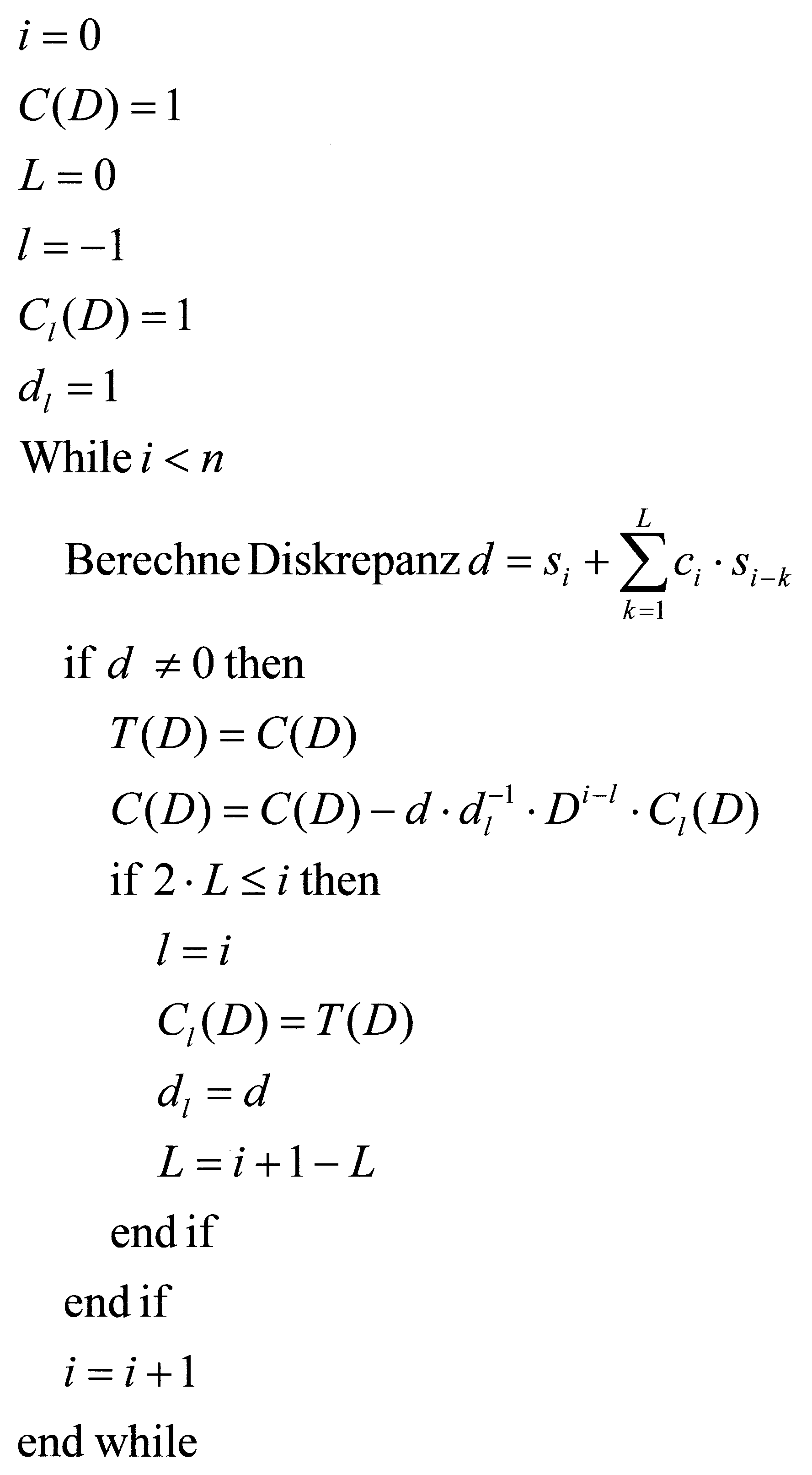 Berlekamp-Massey Algorithmus